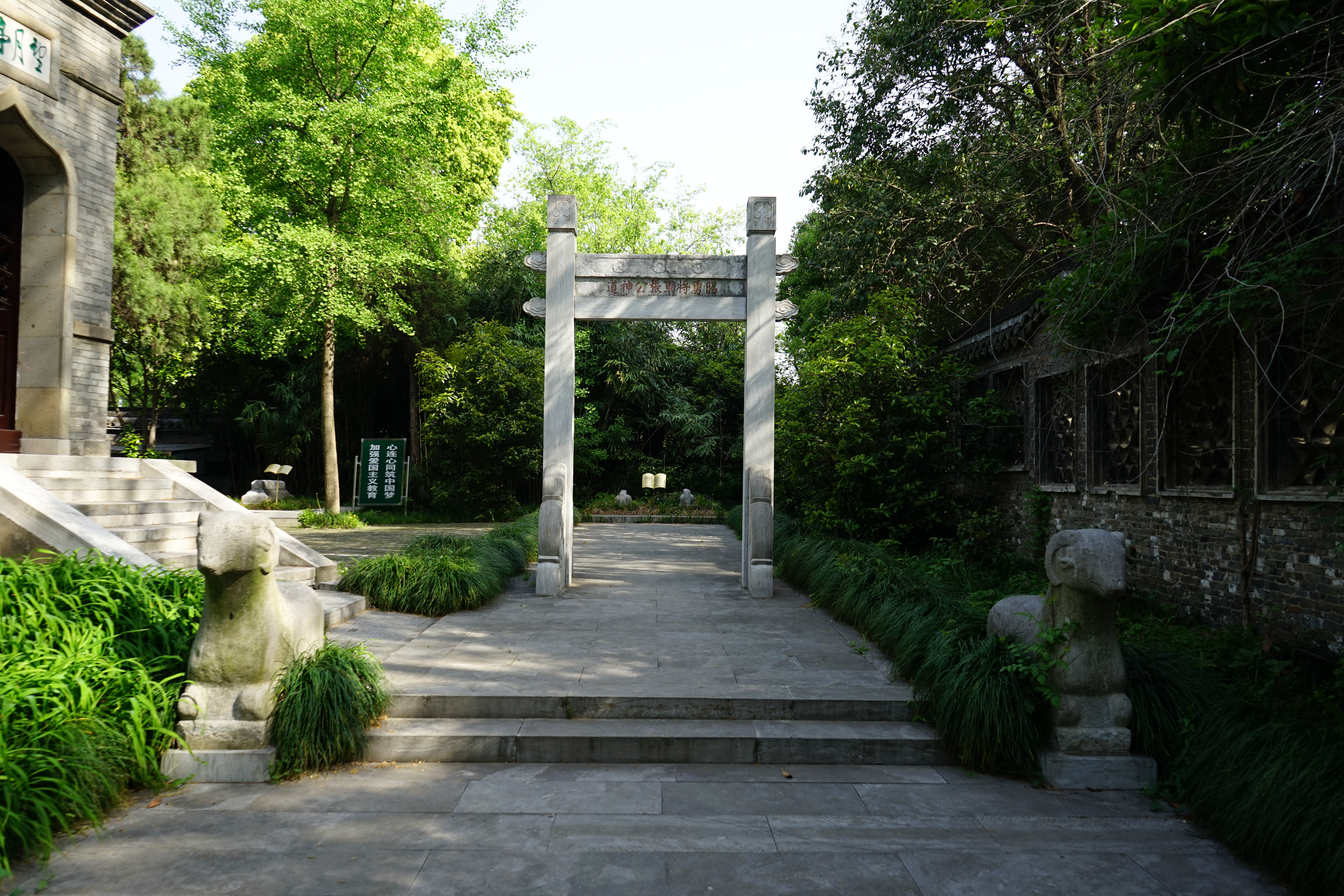 中文（中国大陆）: 昭勇将军墓